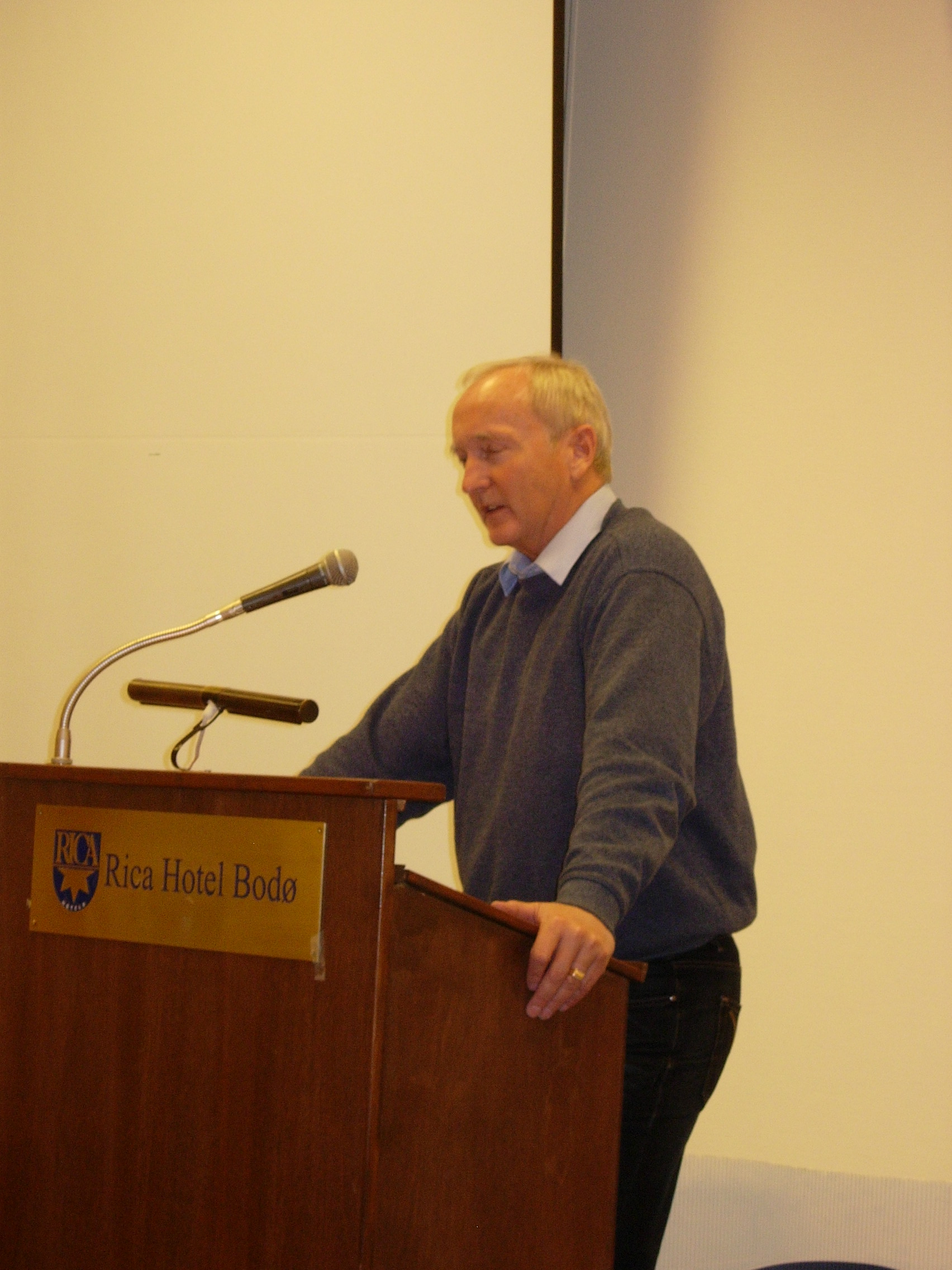 tidligere stortingsrepresentant Søren Fredrik Voie fra Nordland fylke, Høyre